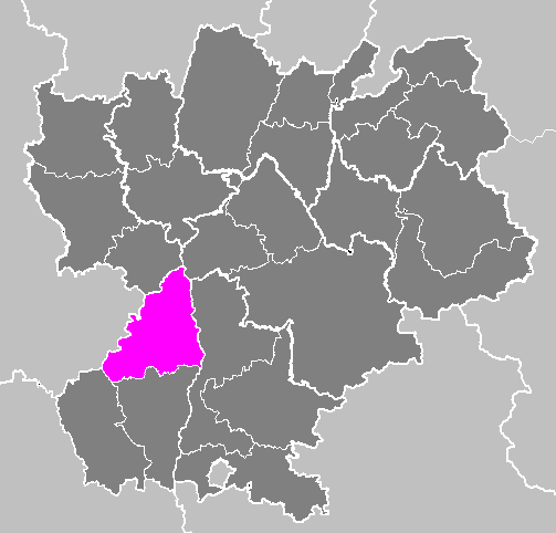 Maps of arrondissements and cantons of France: Arrondissement de Tournon-sur-Rhône.PNG (Région Rhône-Alpes)